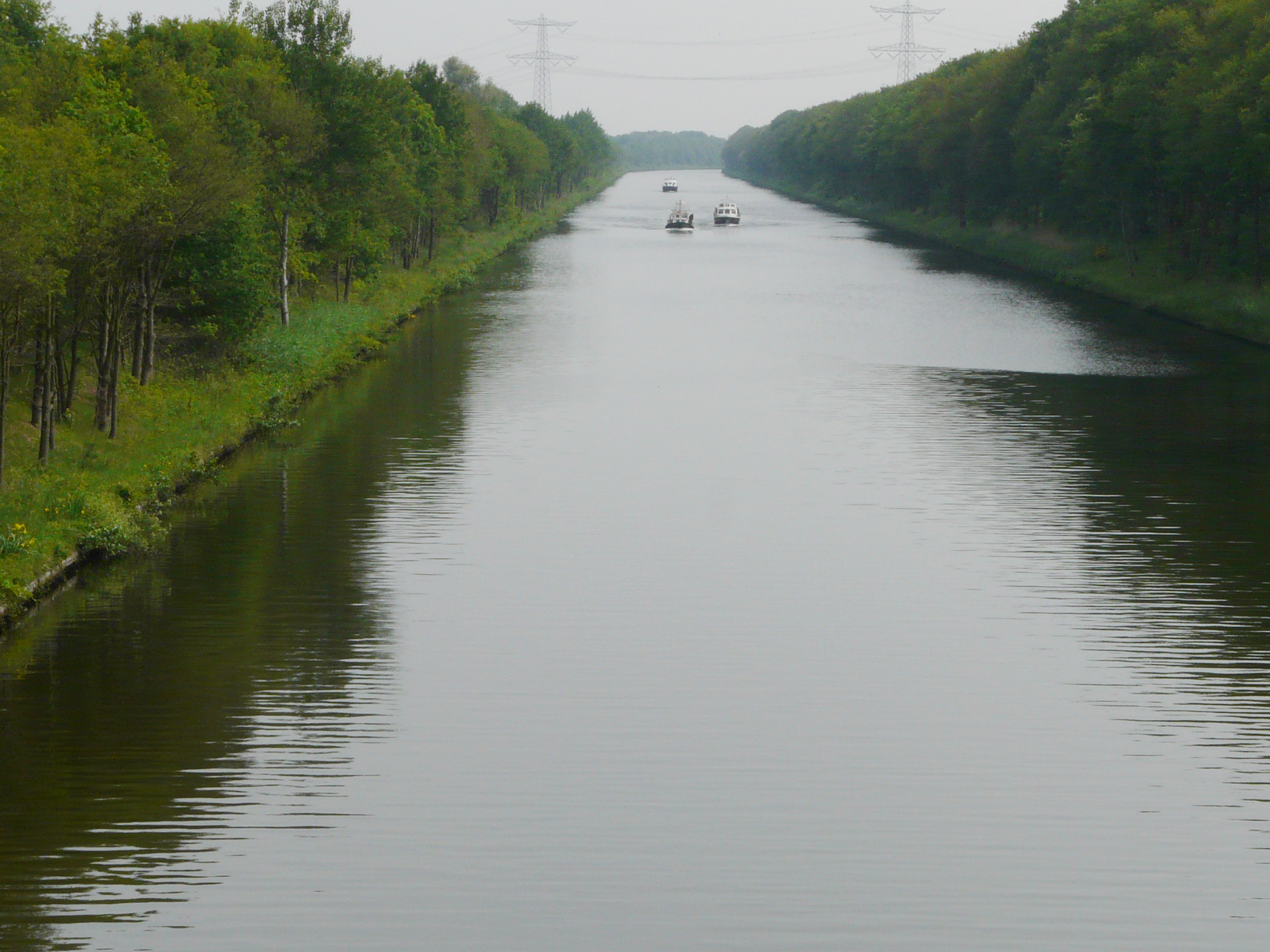 Markkanaal tussen Terheijden en Den Hout